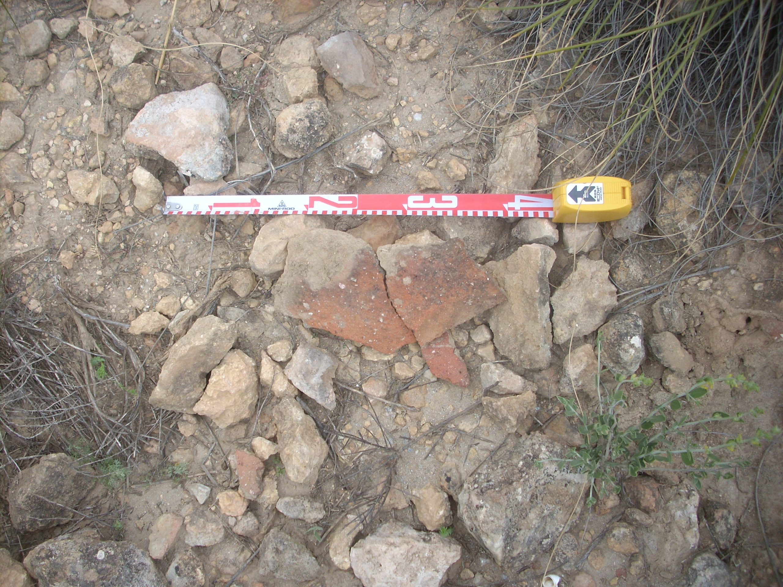 Restos de material cerámico argárico en el yacimiento arqueológico de Vilerda